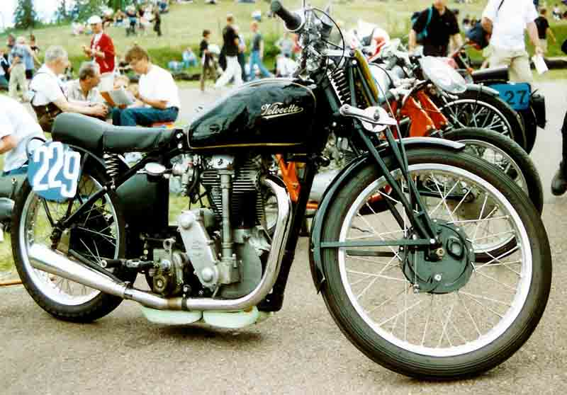 Velocette KSS 350 cc Racer 1936